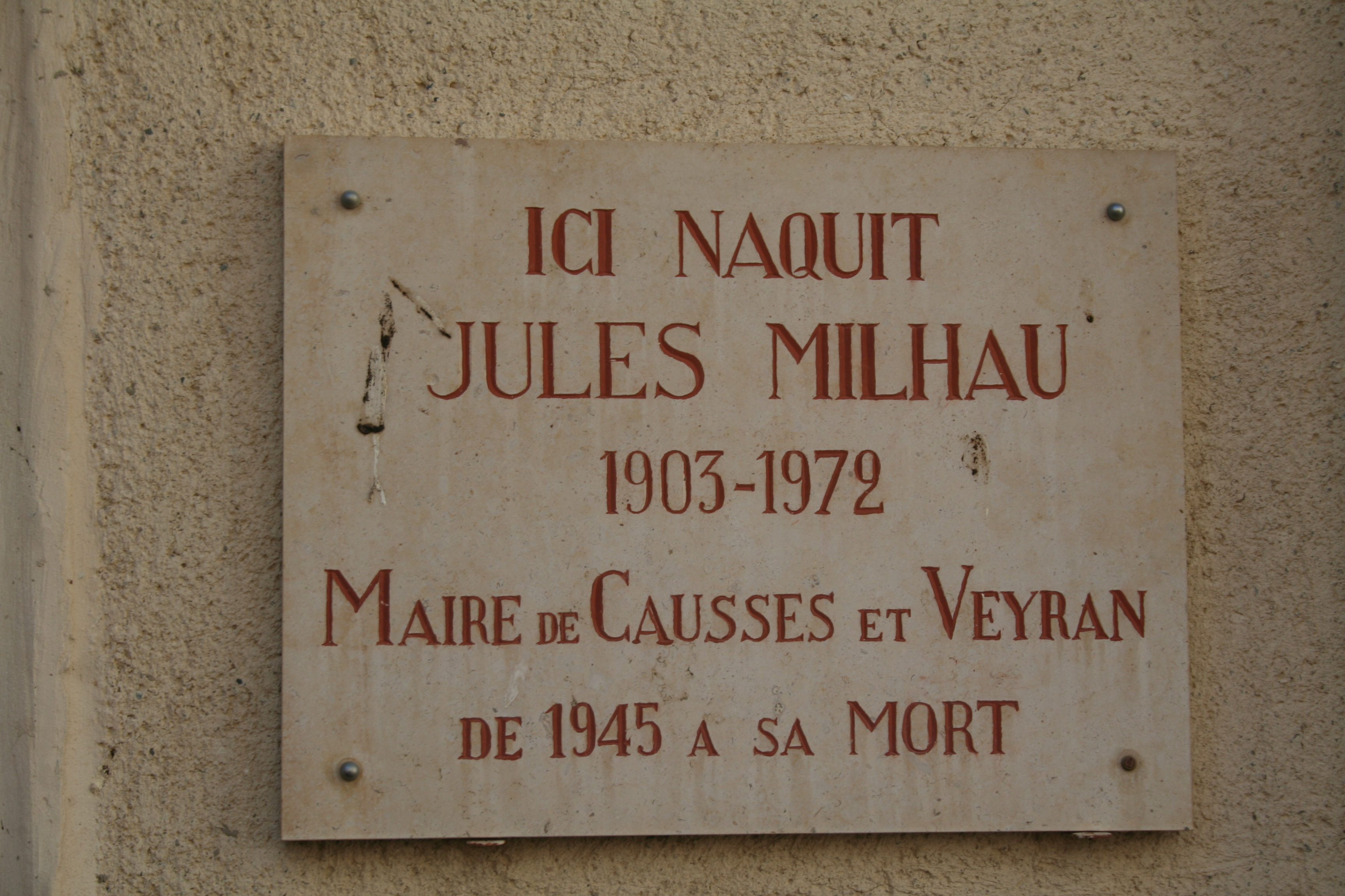 Causses-et-Veyran (Hérault) - plaque sur la maison natale de Jules Milhau (1903-1972), maire de Causses-et-Veyran de 1945 à sa mort.